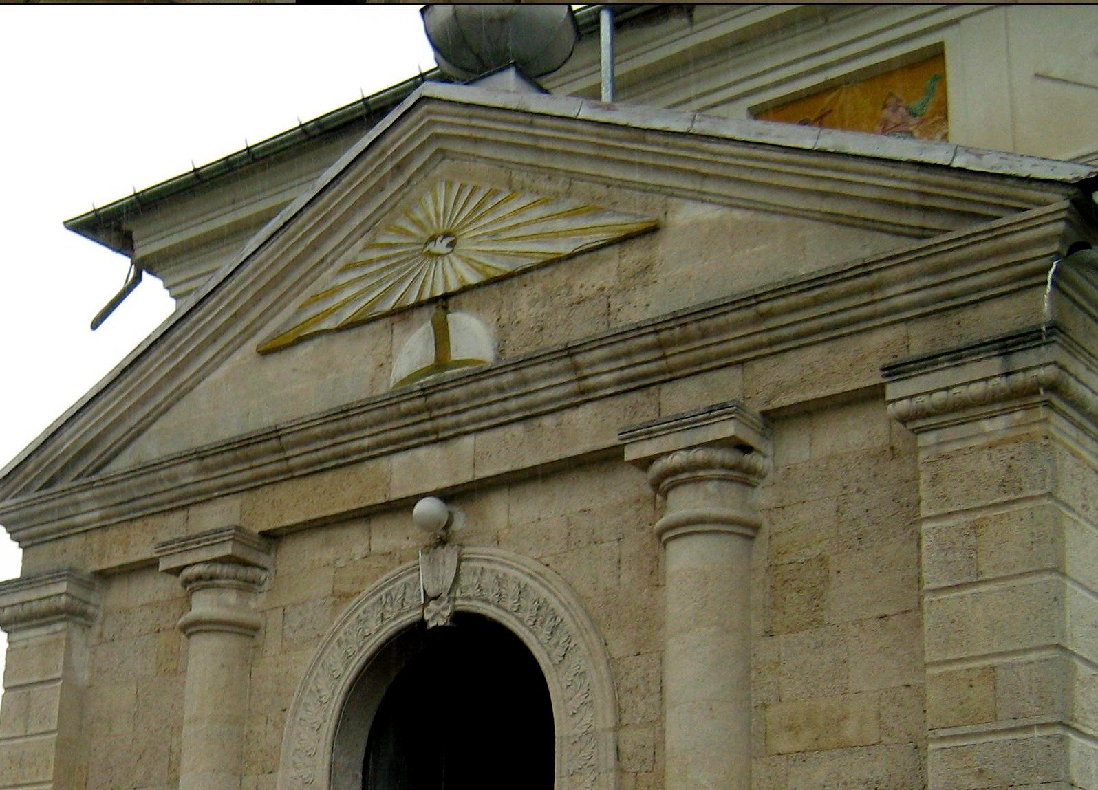 Mănăstirea Rătești